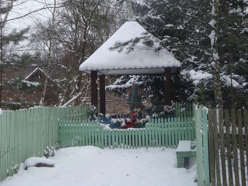 Las Zwierzyniecki w Tarnobrzegu, kaplica św. Onufrego